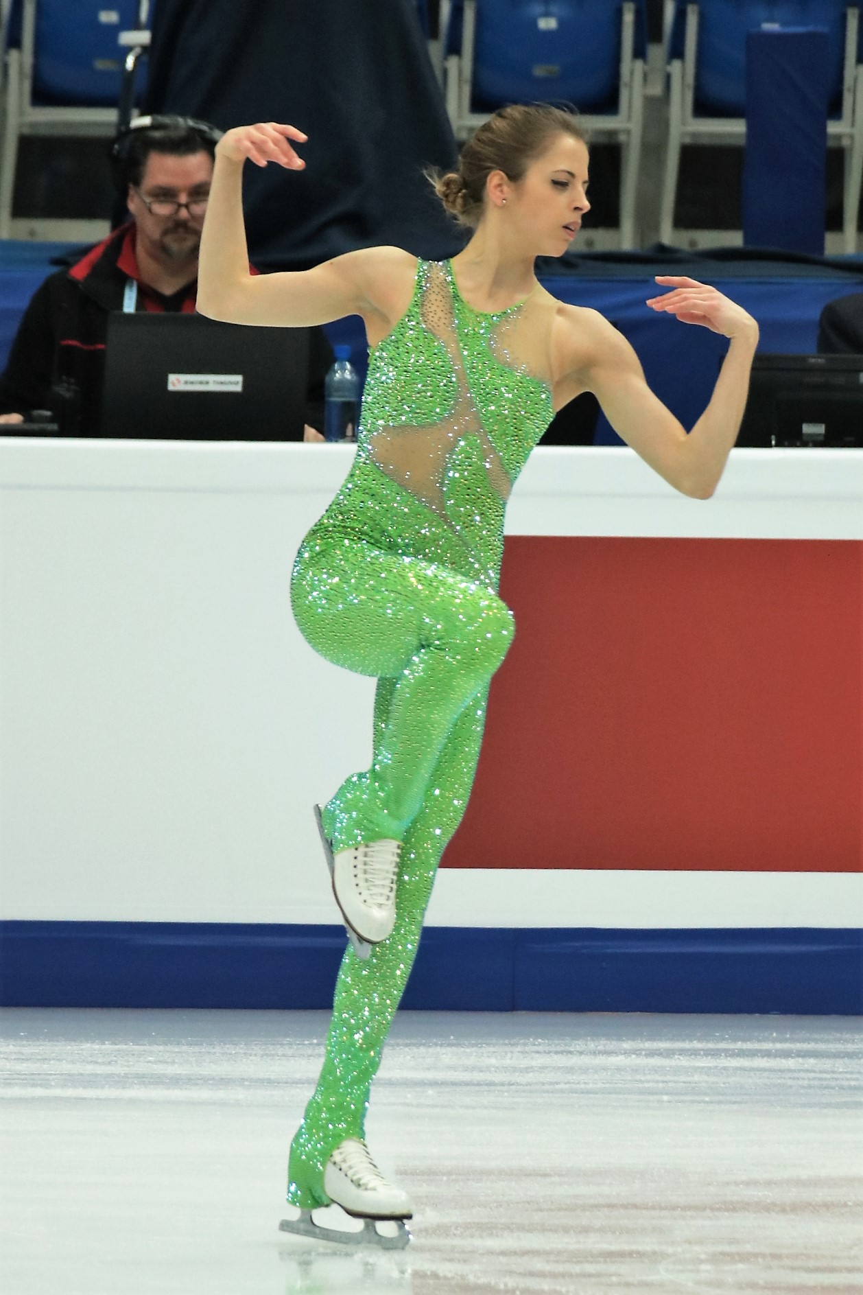 Каролина Костнер (Италия) на Чемпионате Европы по фигурному катанию 2018.